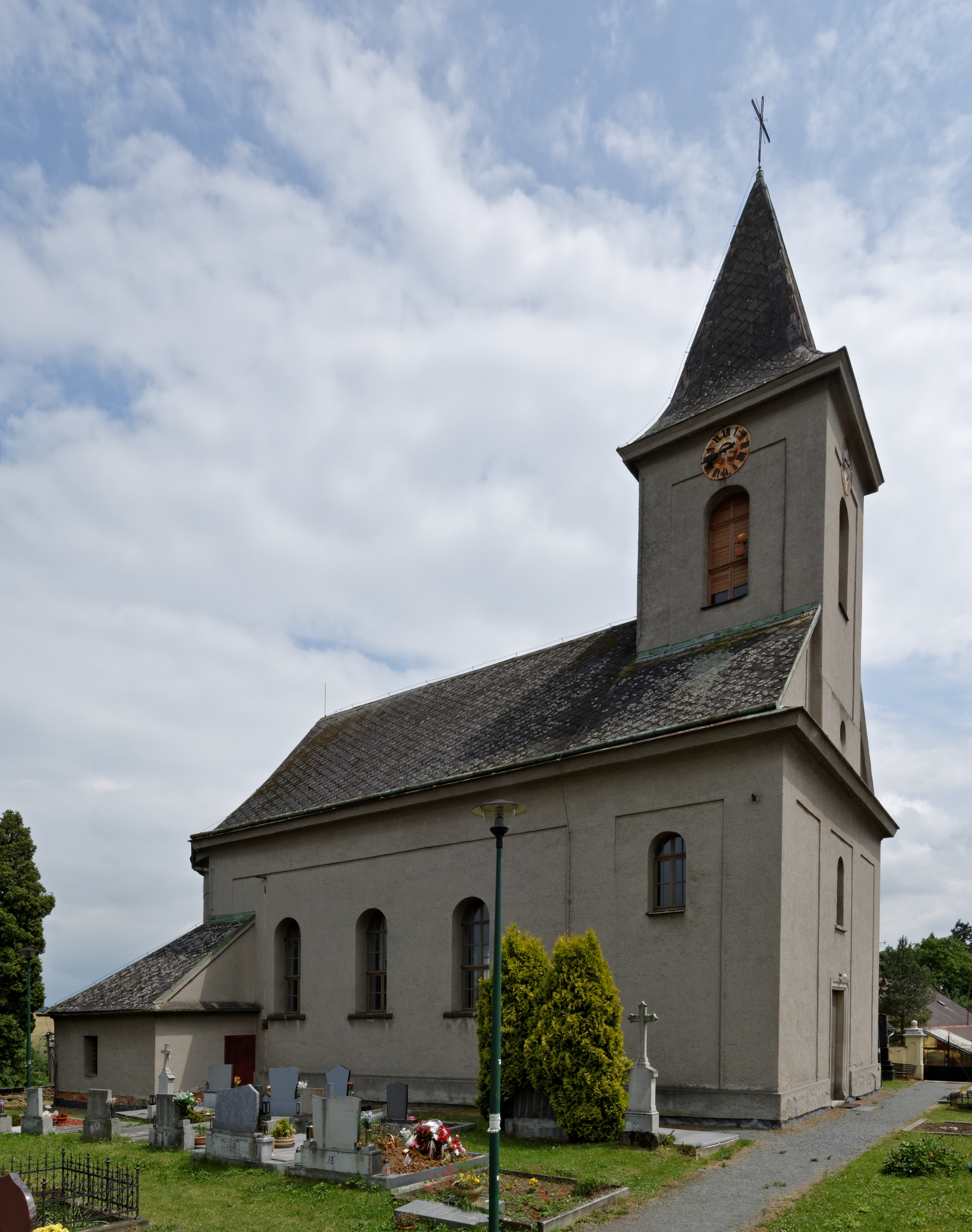 Kostel Nanebevzetí Panny Marie, Sádek (Velké Heraltice). pohled od severozápadu.